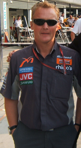 Johnny Herbert in Monza 2006